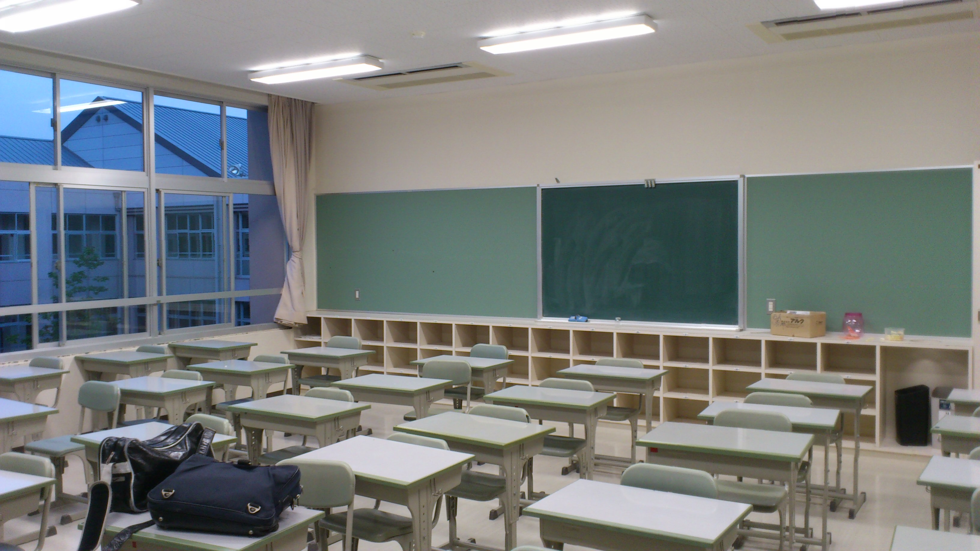 新田青雲の教室です。